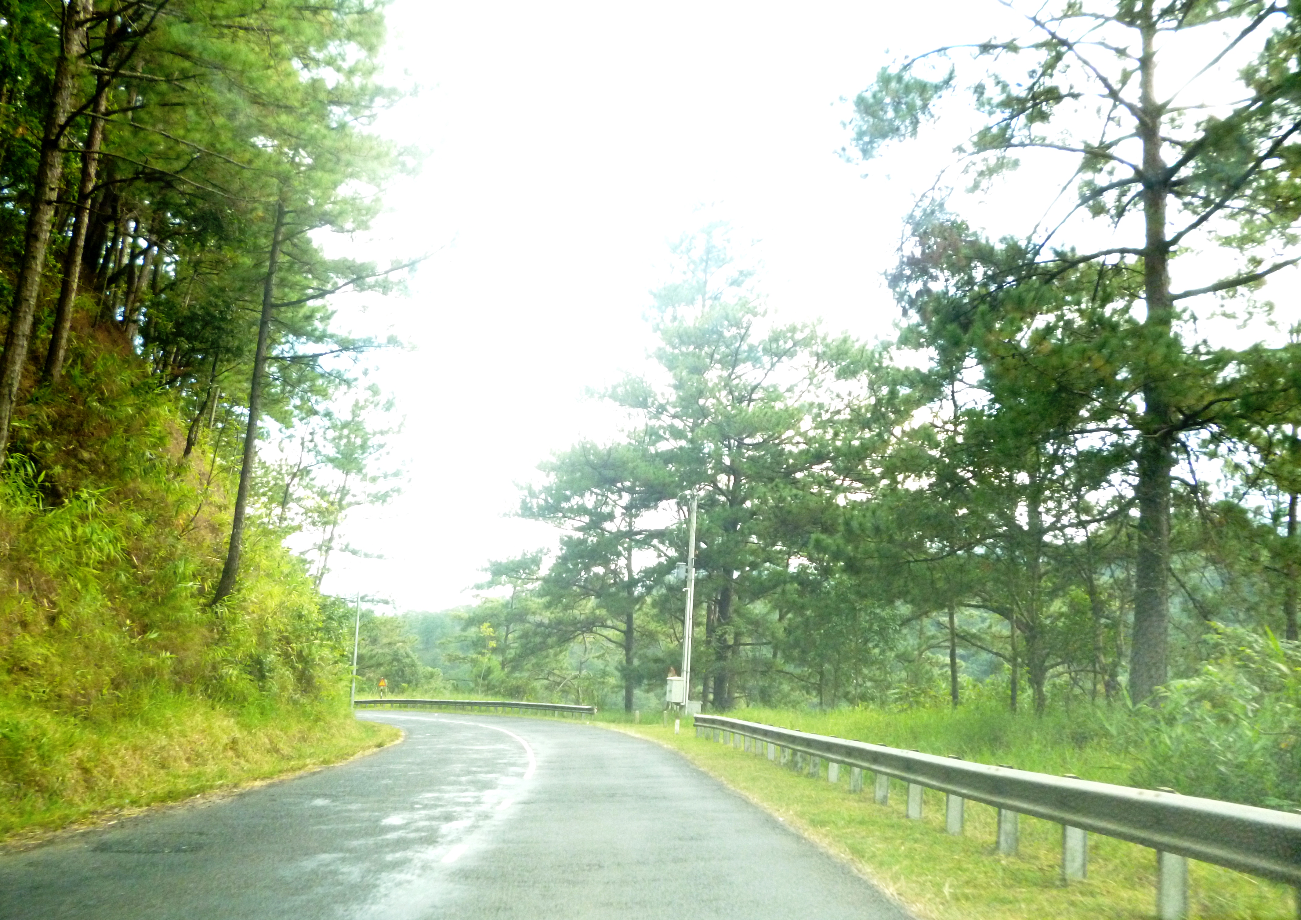 Hình chụp về đèo Prenn bằng máy ảnh cá nhân